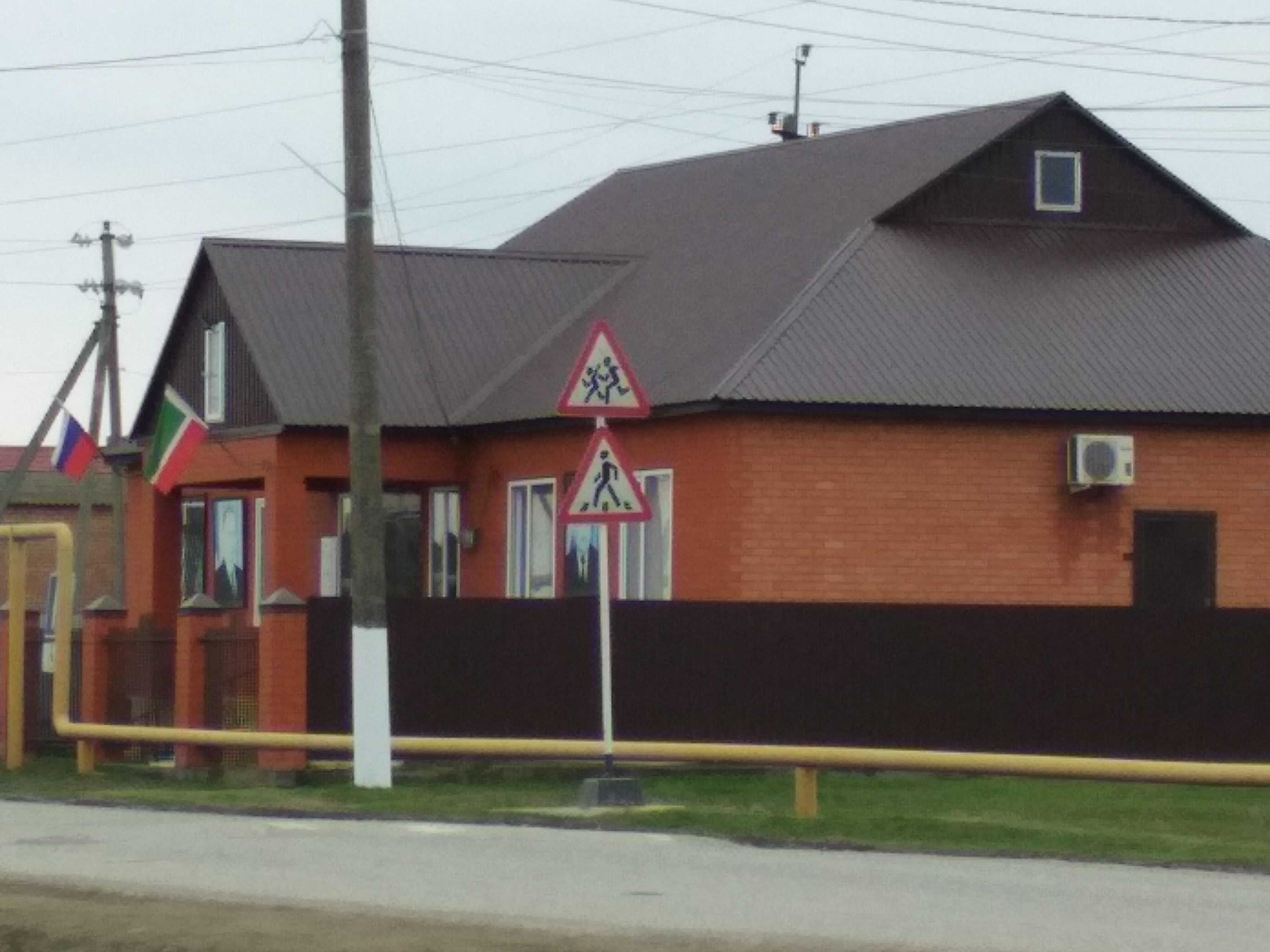 Нохчийн: Iелин-Юьртан администраци